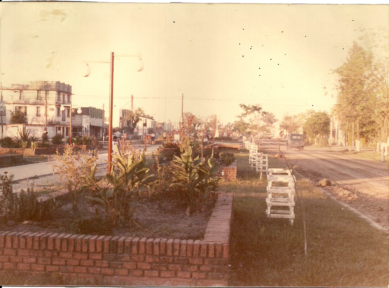 Avenida en la decada del 1980